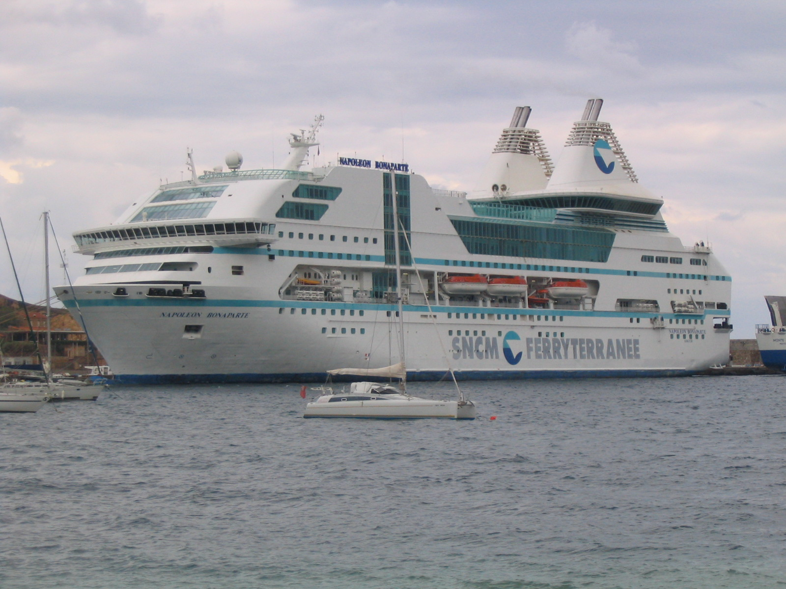 Le cruise-ferry Napoléon Bonaparte dans le port de L'Ile Rousse en 2004.